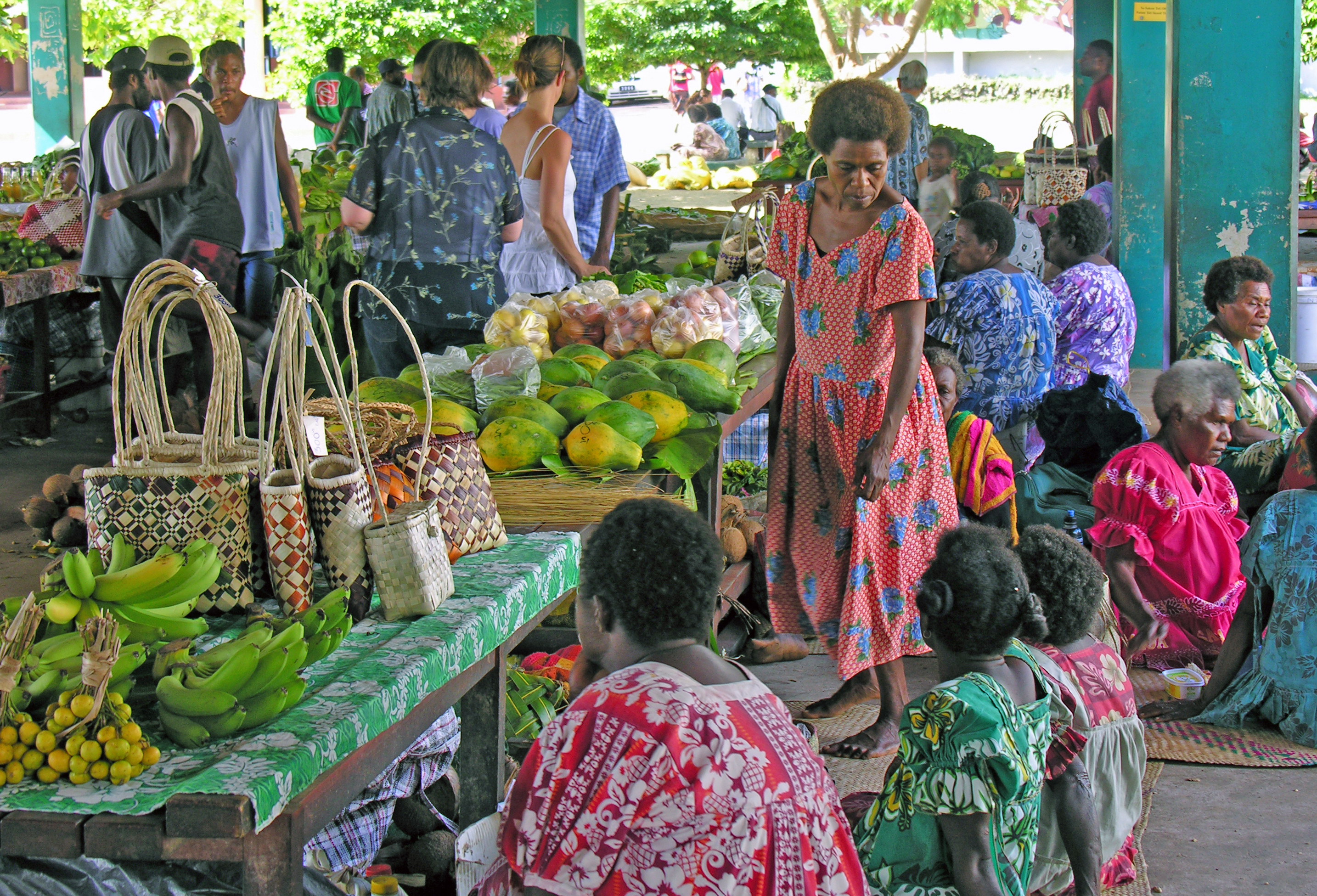 Port Vila market, Vanuatu, 1 June 2006